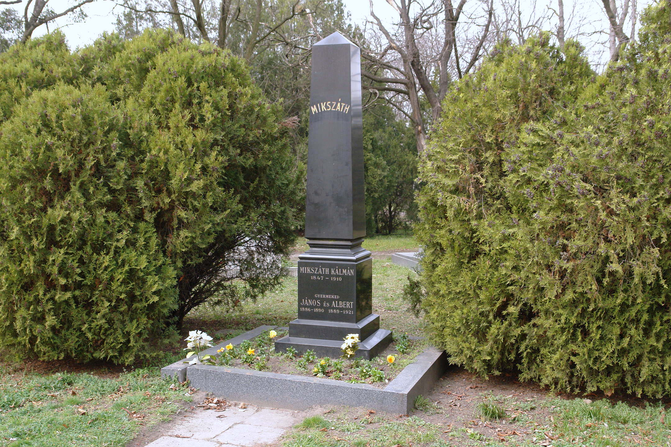 Mikszáth Kálmán író sírja a Fiumei úti Sírkertben (Kerepesi temetőben), Budapest VIII. kerület, Fiumei út 16.